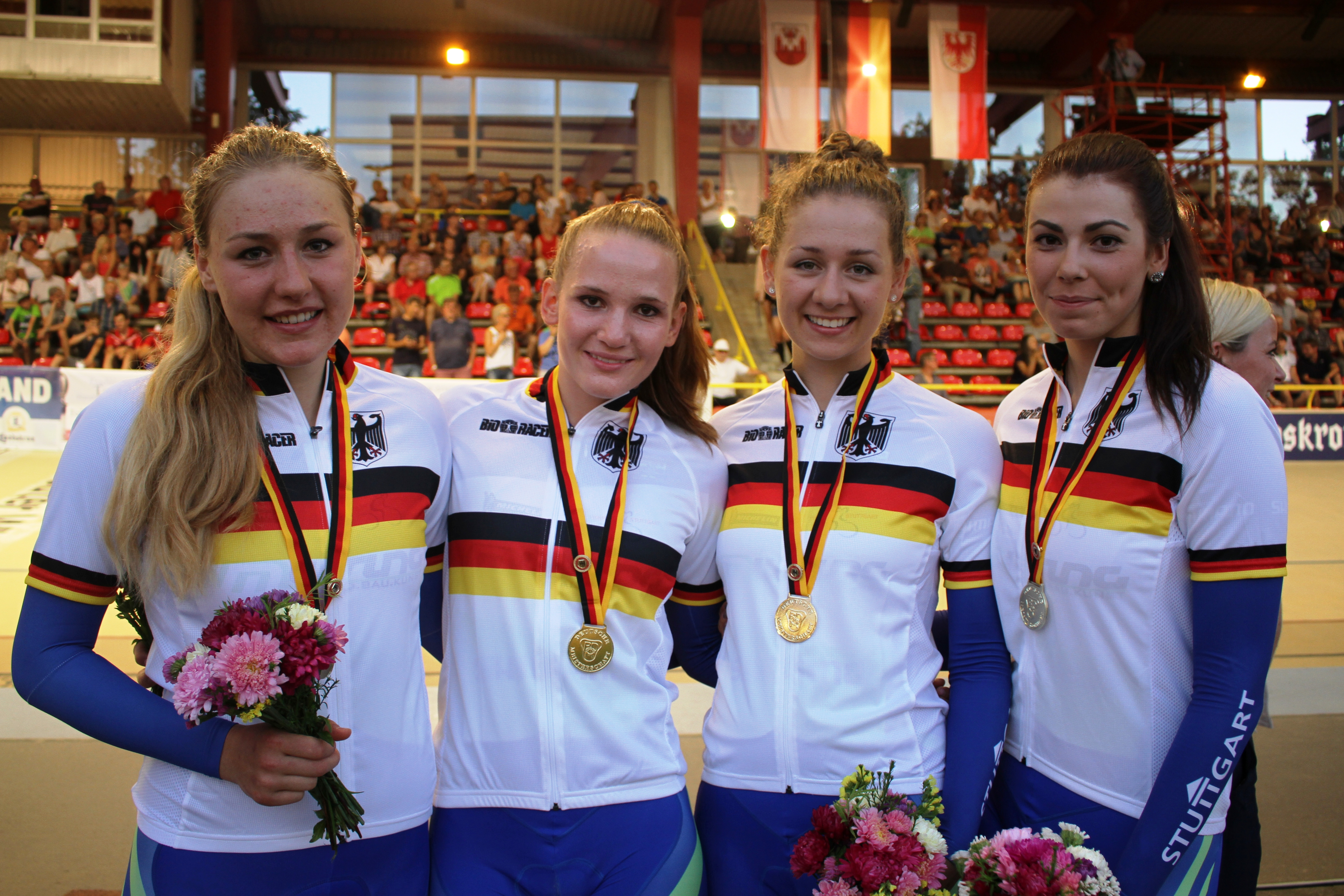 Deutsche Meisterinnen in der Mannschaftsverfolgung, v.l.n.r.: Sofie Mangertseder, Tatjana Paller, Katja Breitenfellner, Laura Süßemilch